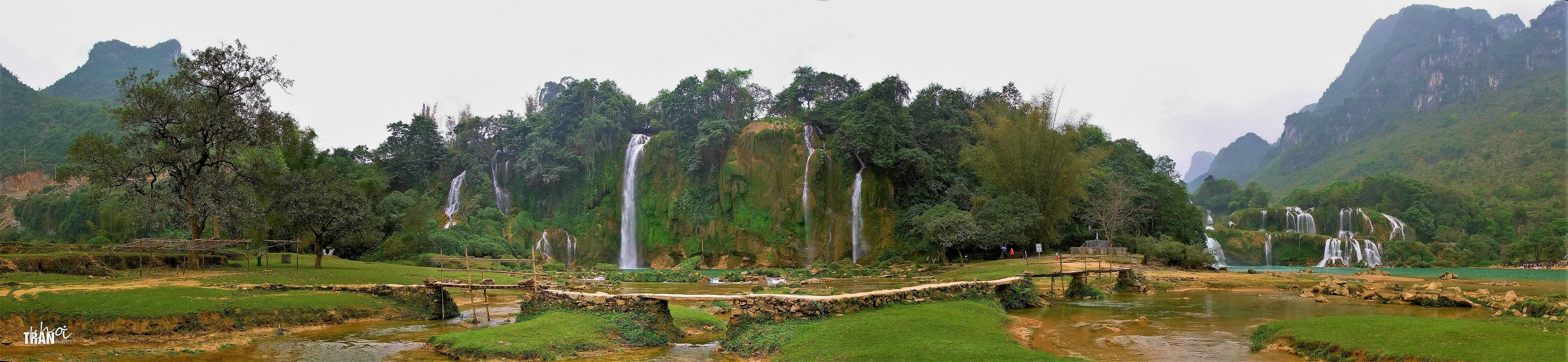 Toàn Cảnh Thác Bản Giốc